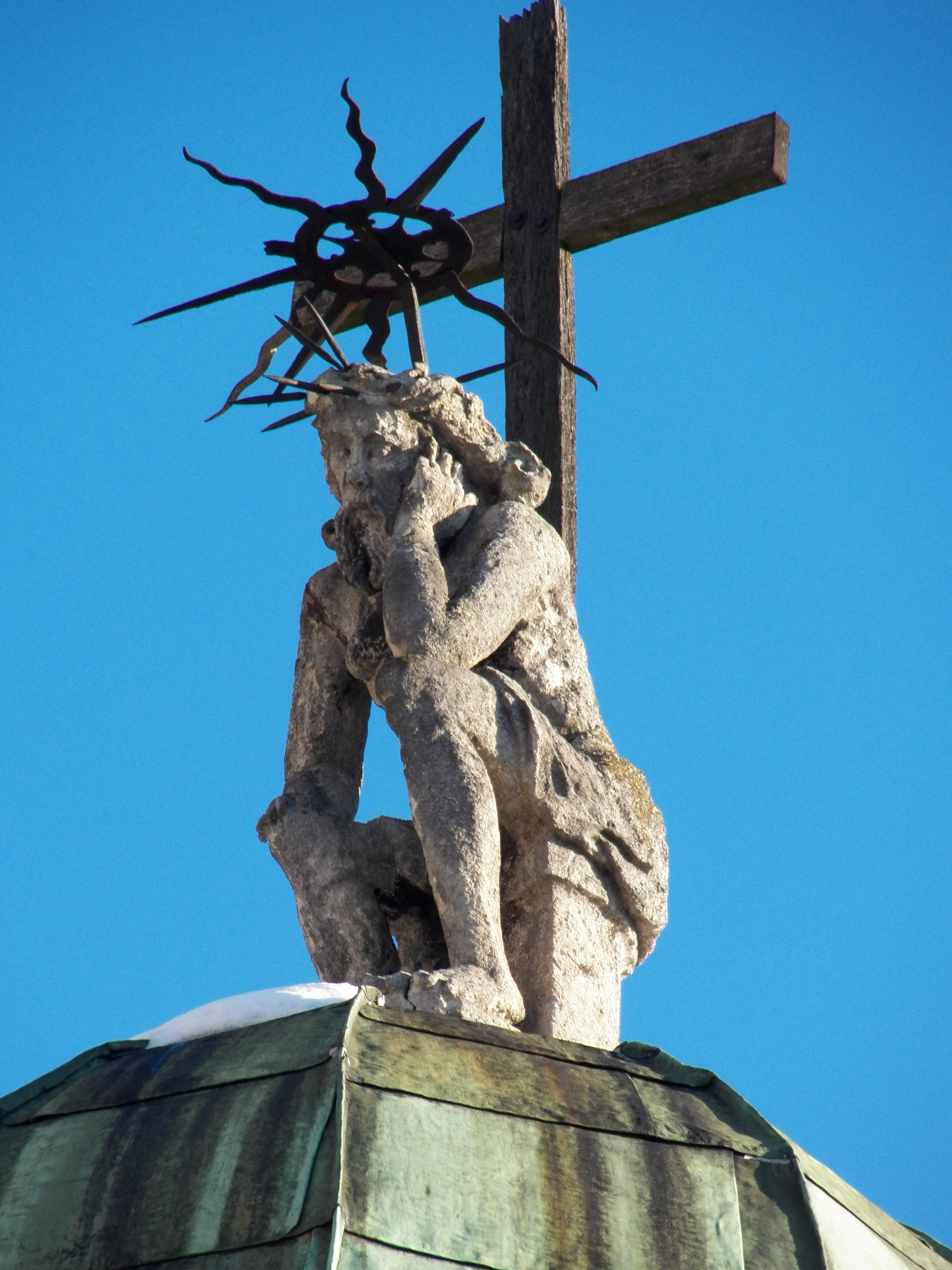 каплиця Боїмів, Львів, Катедральна пл., 1